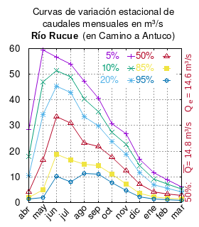 Curvas de variación estacional del río Rucue en Camino a Antuco. # Dirección General de Aguas # Diagnóstico y clasificación de los cursos y cuerpos de agua según objetivos de calidad. Cuenca del río Biobío. # Santiago de Chile # Ministerio de Obras Públicas (Chile) # 2004 # url: # urlarchivo: # Tabla 4.9: Estación Rucue en camino a Antuco pág.79 mes 5% 10% 20% 50% 85% 95% abr 28.528 18.1 10.615 4.22 1.865 1.418 may 59.409 46.916 34.191 16.574 5.034 2.02 jun 56.643 51.529 45.333 33.493 18.909 10.343 jul 53.95 48.88 42.74 31 16.55 8.06 ago 47.185 40.33 33.346 23.186 14.819 11.393 sep 40.701 35.45 29.975 21.707 14.362 11.029 oct 30.63 27.46 23.87 17.67 11.08 7.69 nov 26.71 22.8 18.72 12.55 7.08 4.59 dic 16.988 14.358 11.542 7.207 3.579 2.196 ene 11.65 9.25 7 4.1 2.12 1.44 feb 8.853 7.08 5.4 3.219 1.702 1.17 mar 6.19 5.241 4.252 2.758 1.431 0.828 This plot was created with Gnuplot.